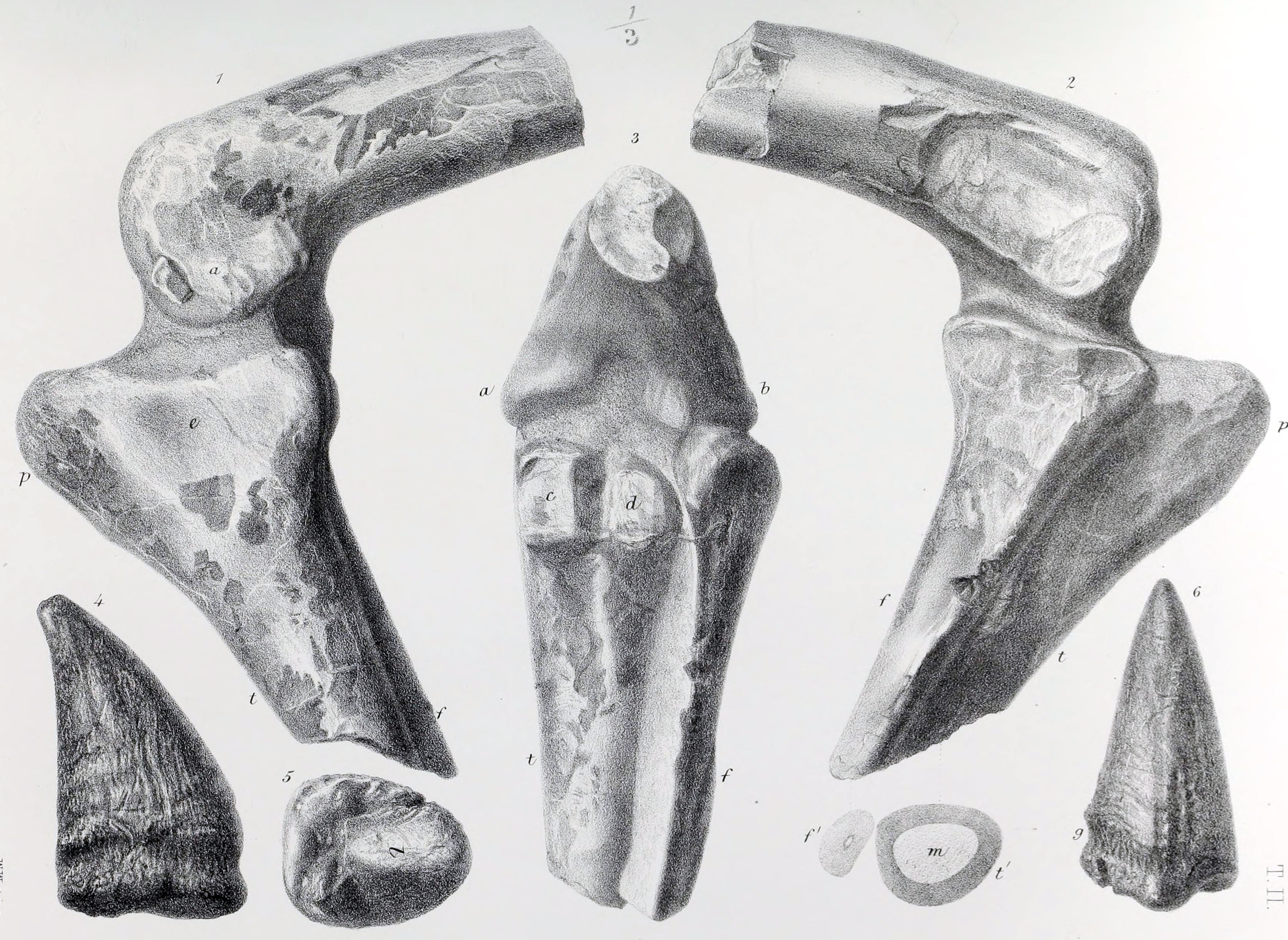 Knee joint of Merosaurus.